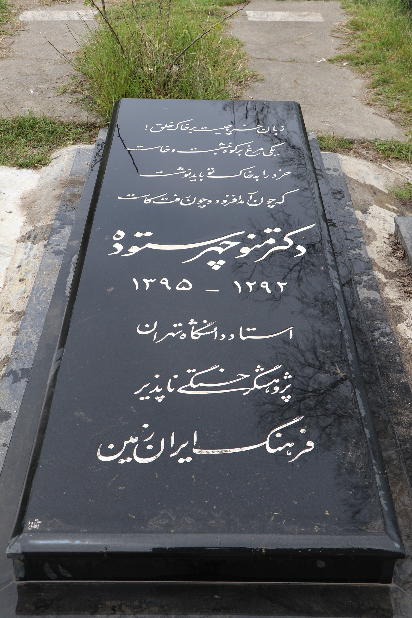 مزار دکتر ستوده در گورستان تازه آباد شهرستان سلمان شهر